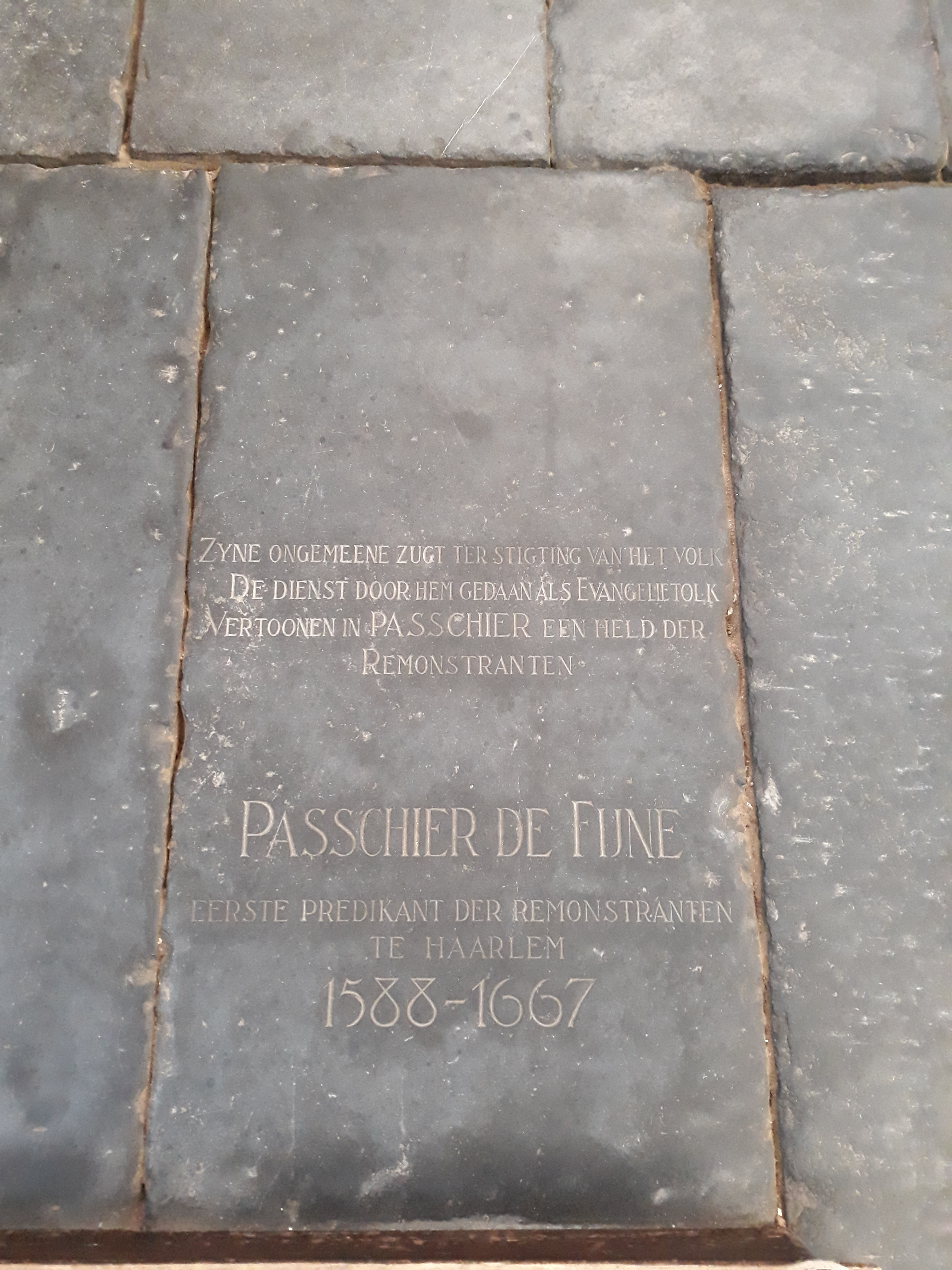 Das Grab des niederländischen Predigers und Begründers der Remonstranten Passchier de Fijne in der Bavokirche Haarlem.